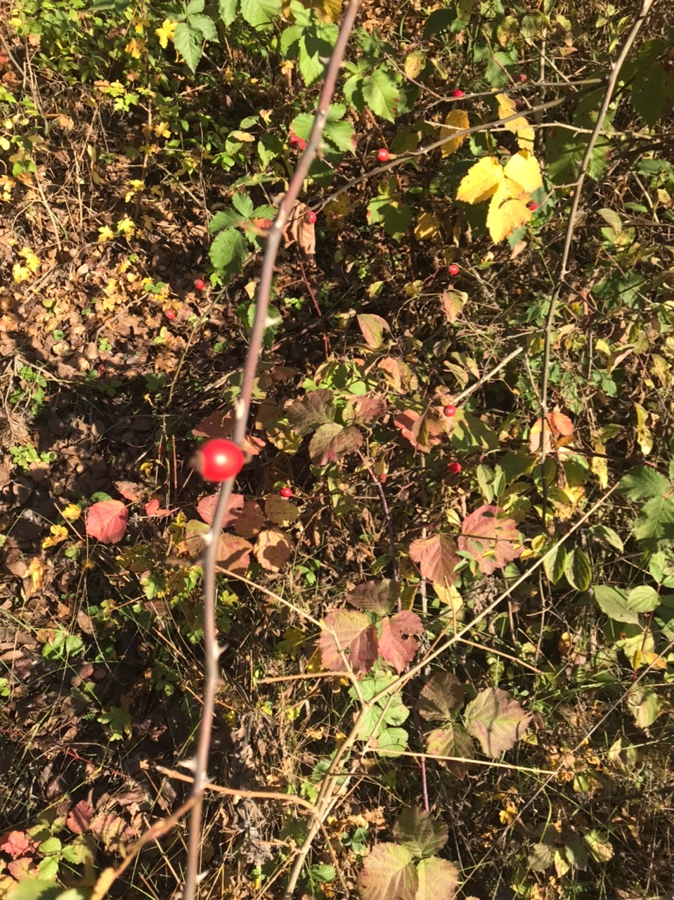 jéřáb krasový na pp Hvížďalka